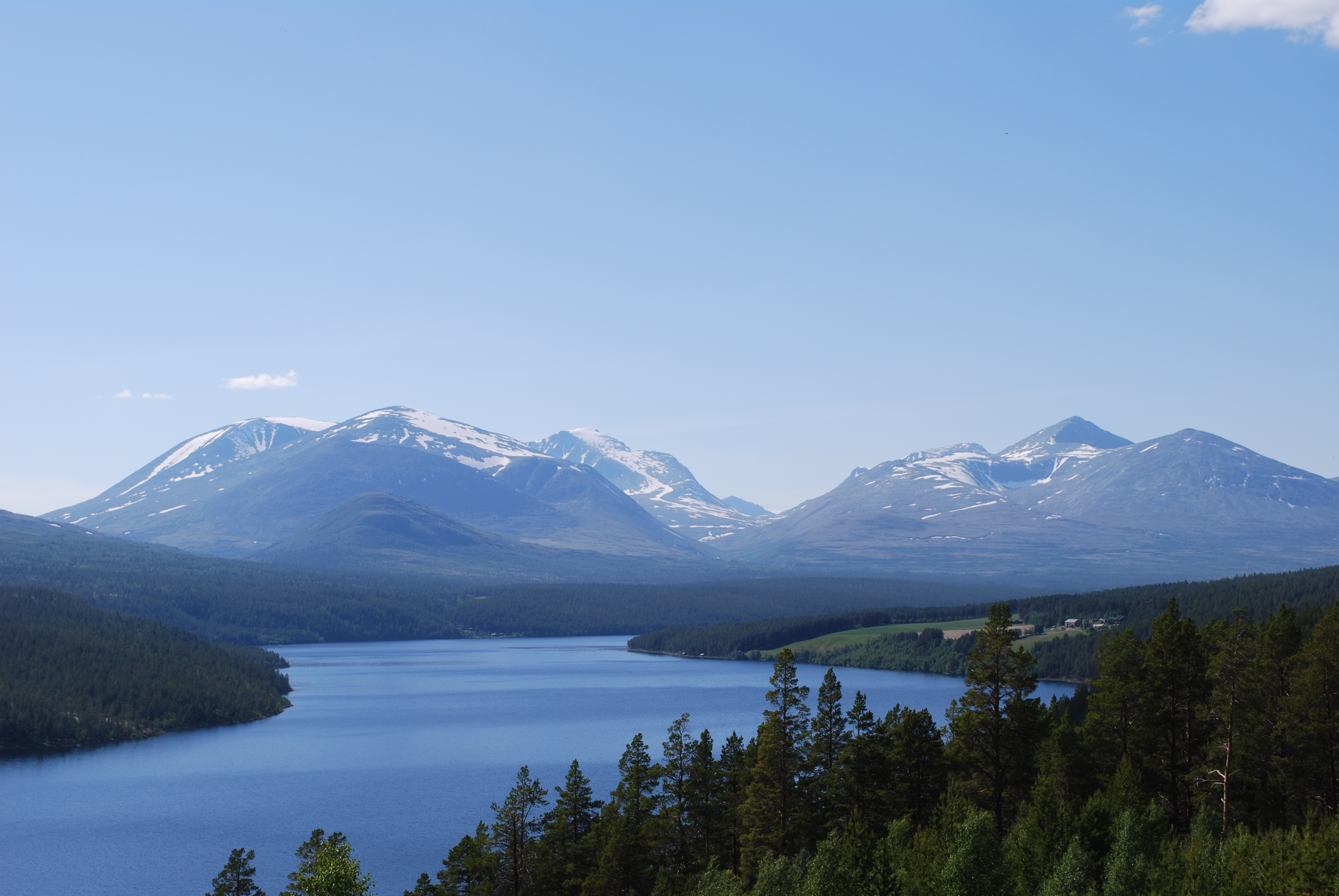 Atnsjøen i forgrunnen og Rondane-massivet i bakgrunnen. Fra venstre mot høyre: Illmanndalen, Storronden, Rondvasshøgde, Rondslottet, Langglupdalen, Søre Oksle, Høgronden, Storsvulten.